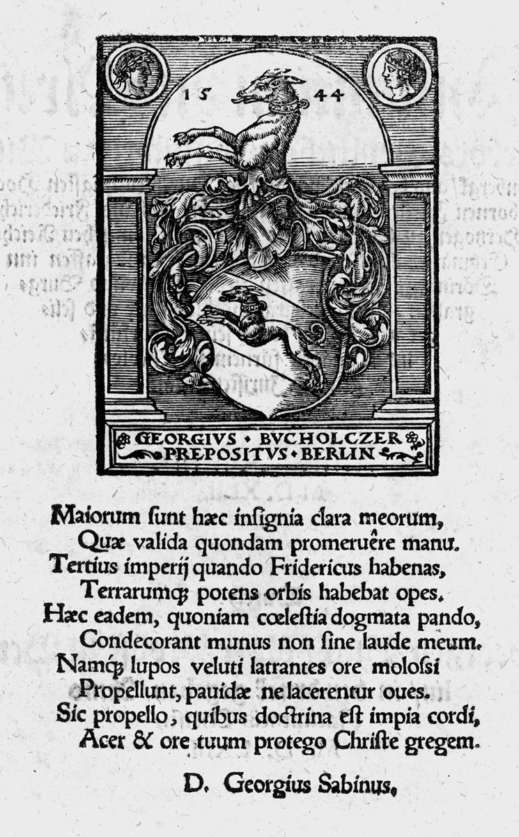 Familienwappen Buchholzer "Georgius Bucholczer Prepositus Berlin" mit Jahreszahl 1544, Holzschnitt aus: Georg Buchholzer: Constitution und Artickel des Geistlichen Consistorij zu Wittembergk, aus befehlich, Frankfurt an der Oder : Johann Eichhorn, 1563